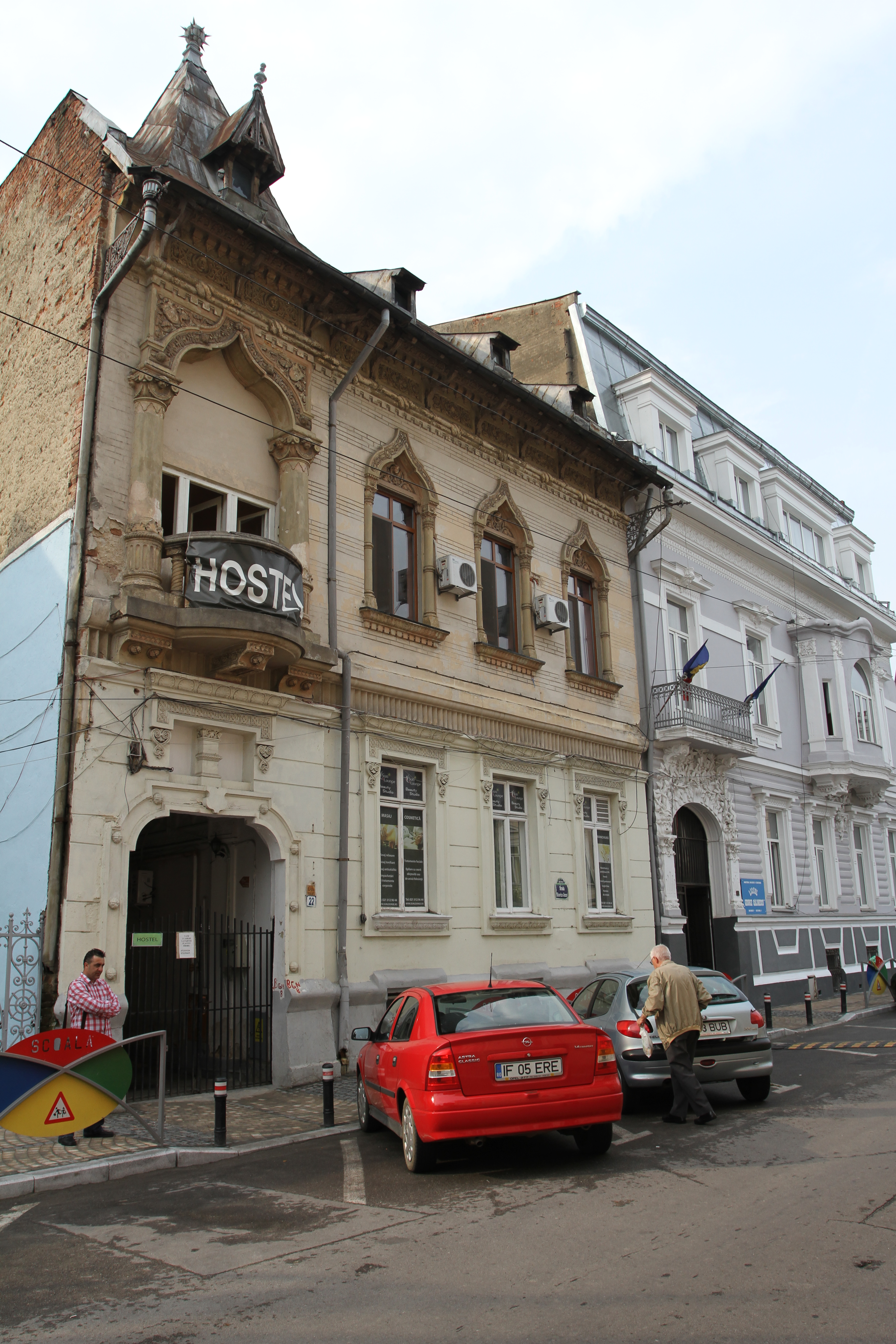 Casa Savulescu. Construită după planurile arhitectului Al. Savulescu, in anul 1890. Construcție în stil eclectic cu influente clasiciste.